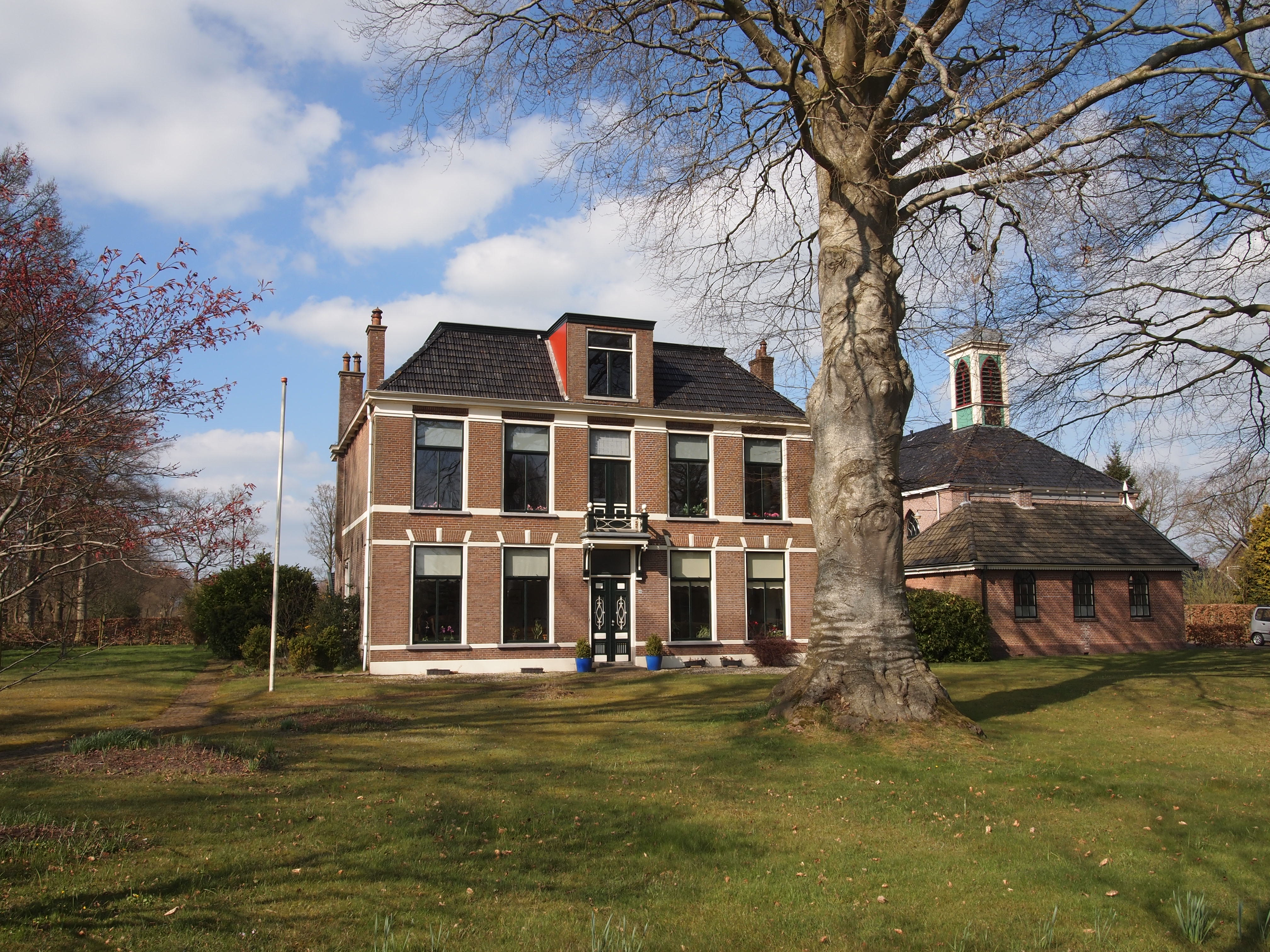 Pastorie en Hervormde kerk in Noordbergum